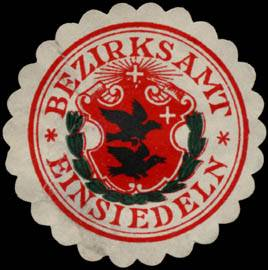 Sealing stamp Title: Bezirksamt - Einsiedeln Description: bunt Place: Einsiedeln size: 4 cm